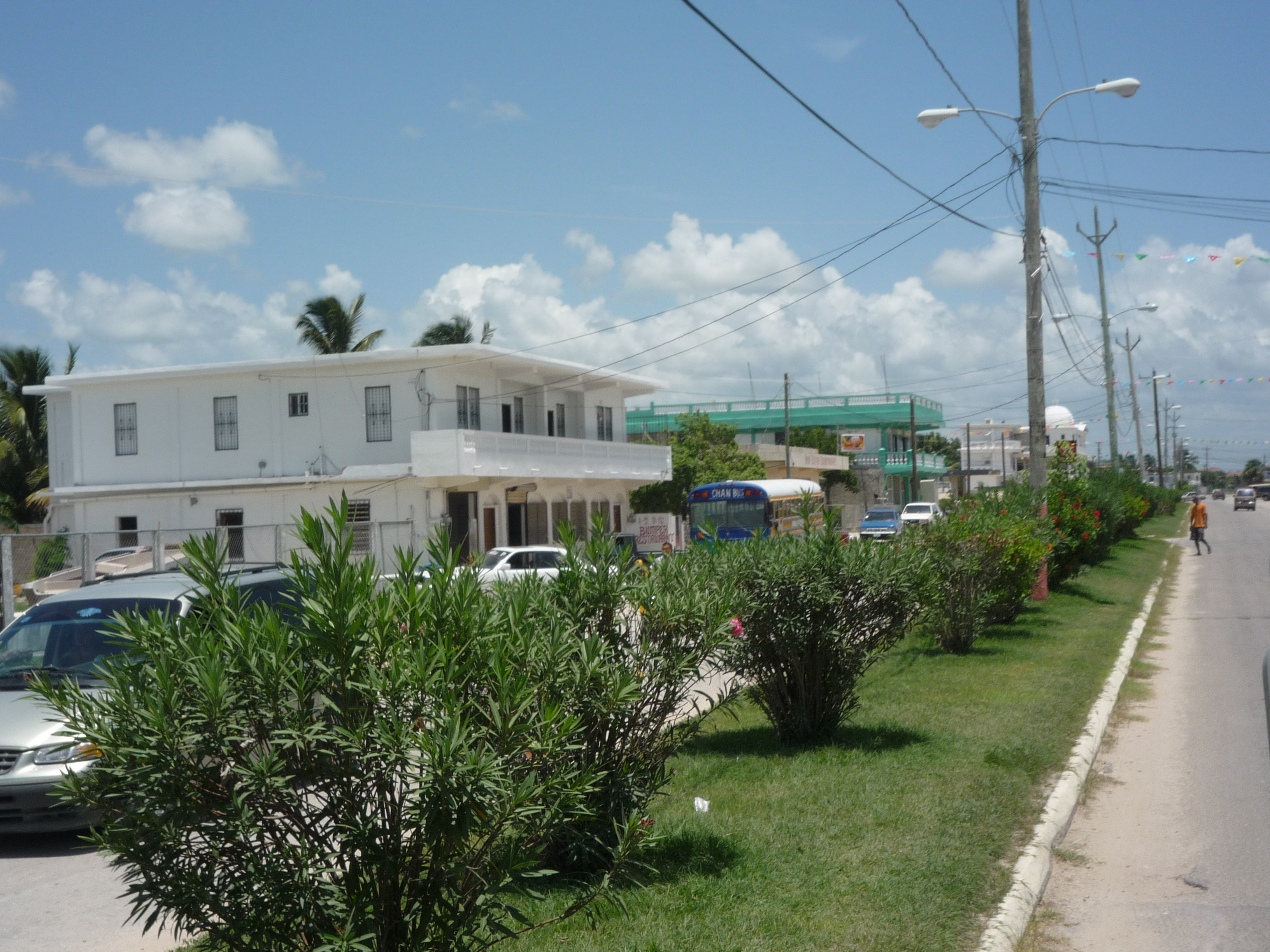 Corozal Town.